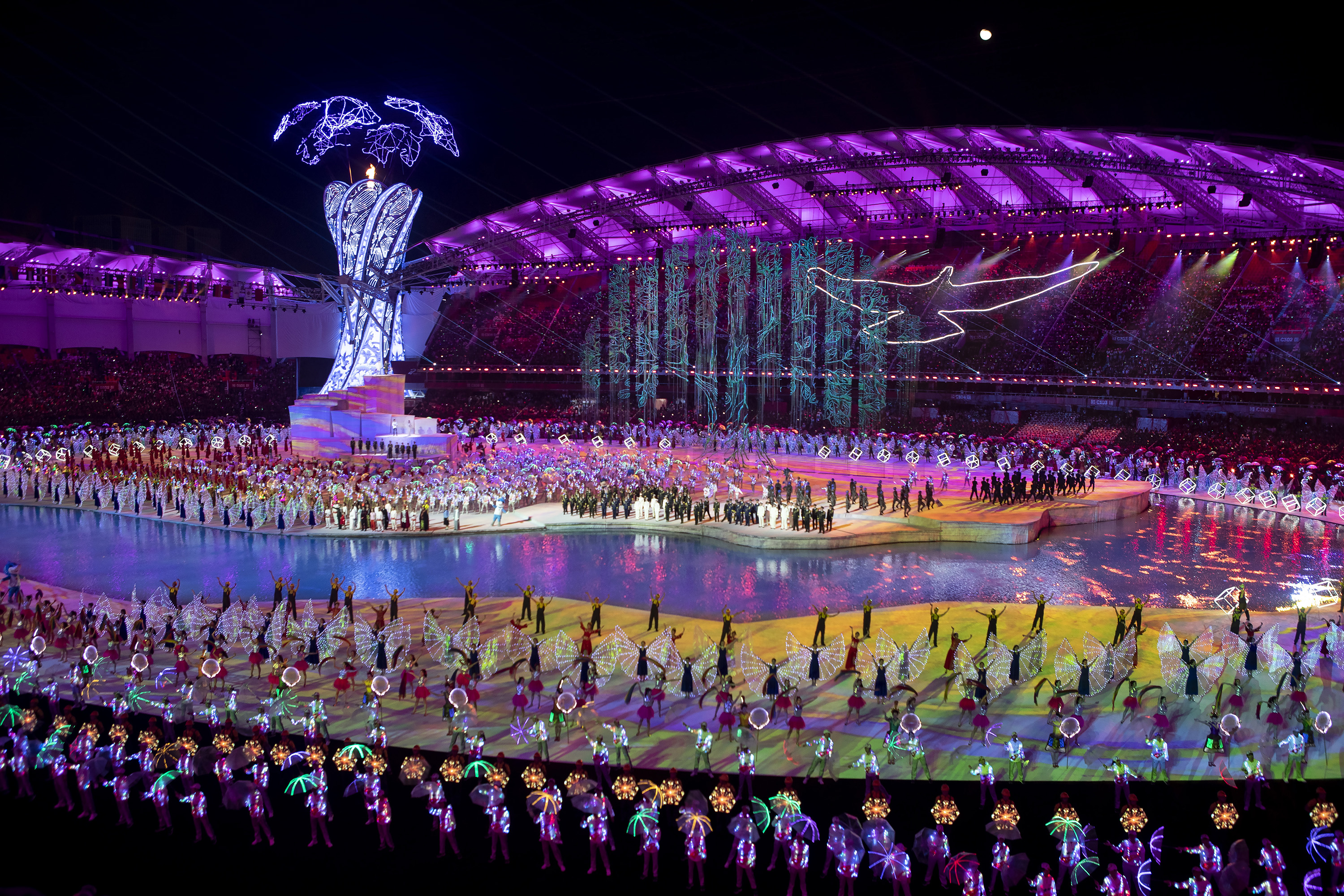 China, Wuhan, 18 oktober 2019.Militaire wereldspelen in China, van 17 tot 29 oktober.Ongeveer 10.000 atleten uit 105 landen (onder wie ca 160 Nederlanders) nemen deel aan dit evenement.Openingsceremonie van de 7e militaire wereldspelen.